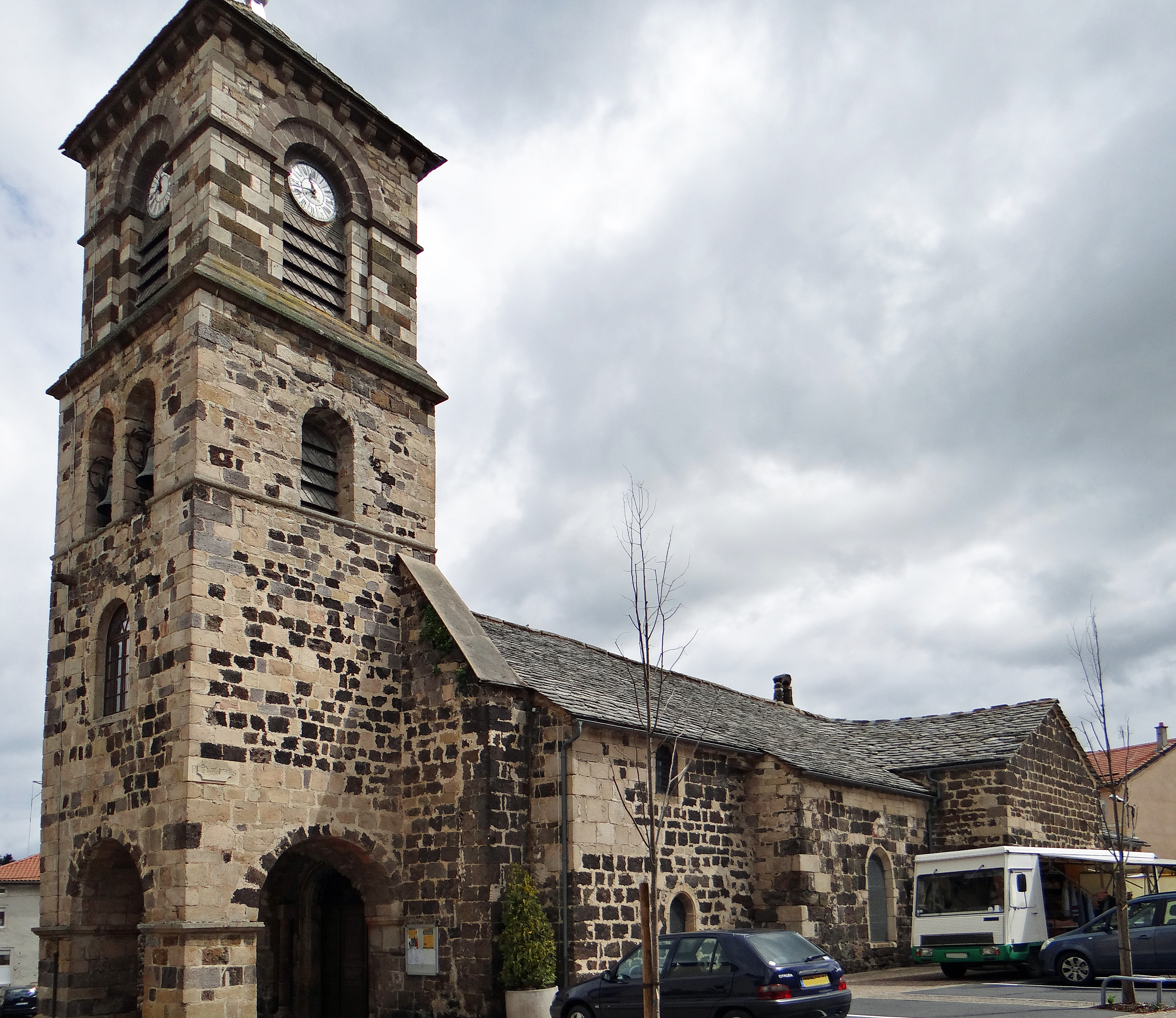 Laussonne - Église Saint-Pierre-aux-Liens - Tour-clocher